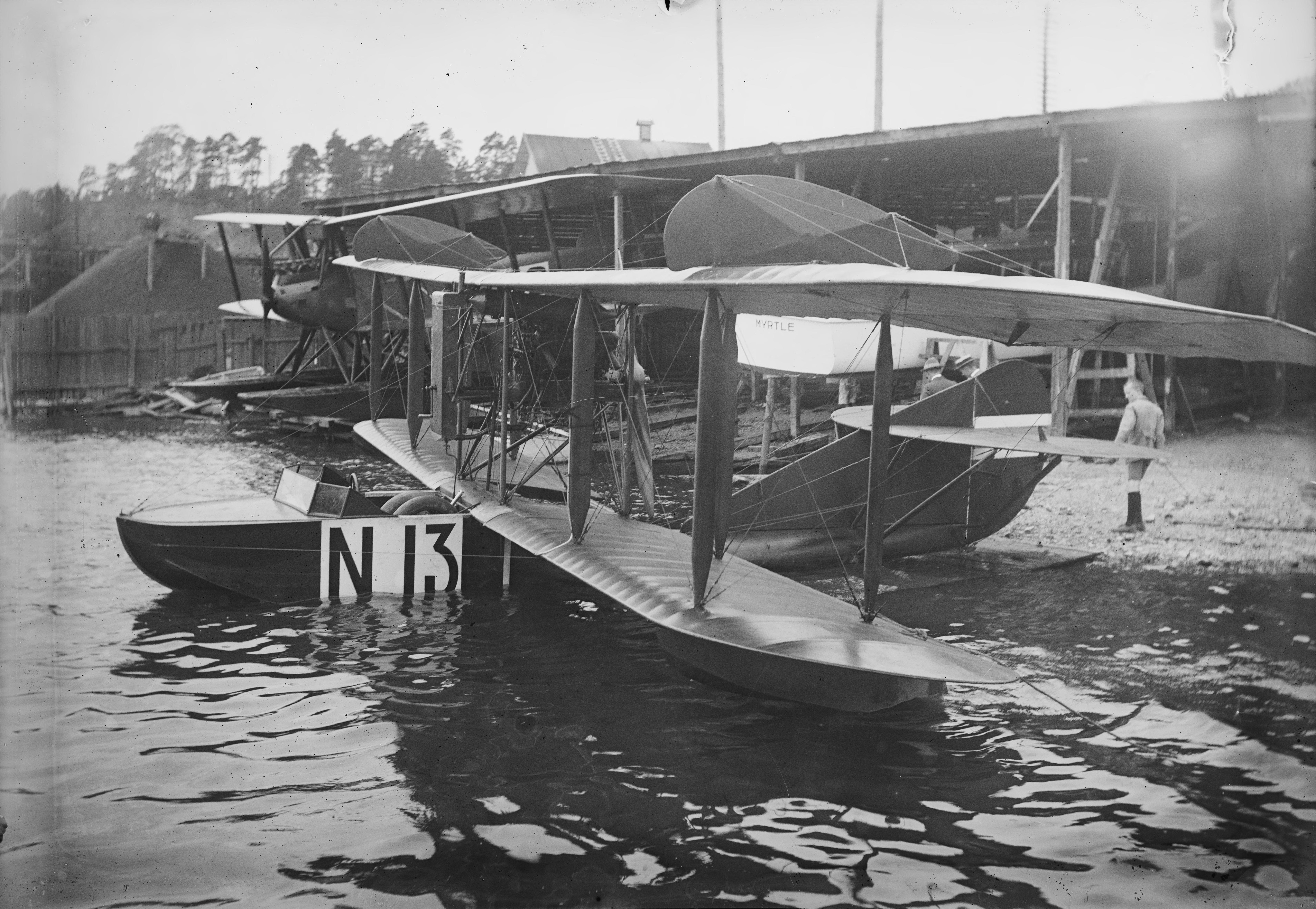 Bildet er hentet fra Nasjonalbibliotekets bildesamling. Anmerkninger til bildet var: Påskrift arkivark: Løitnant Næss Arkivnummer: 355 Oslo, Oslo